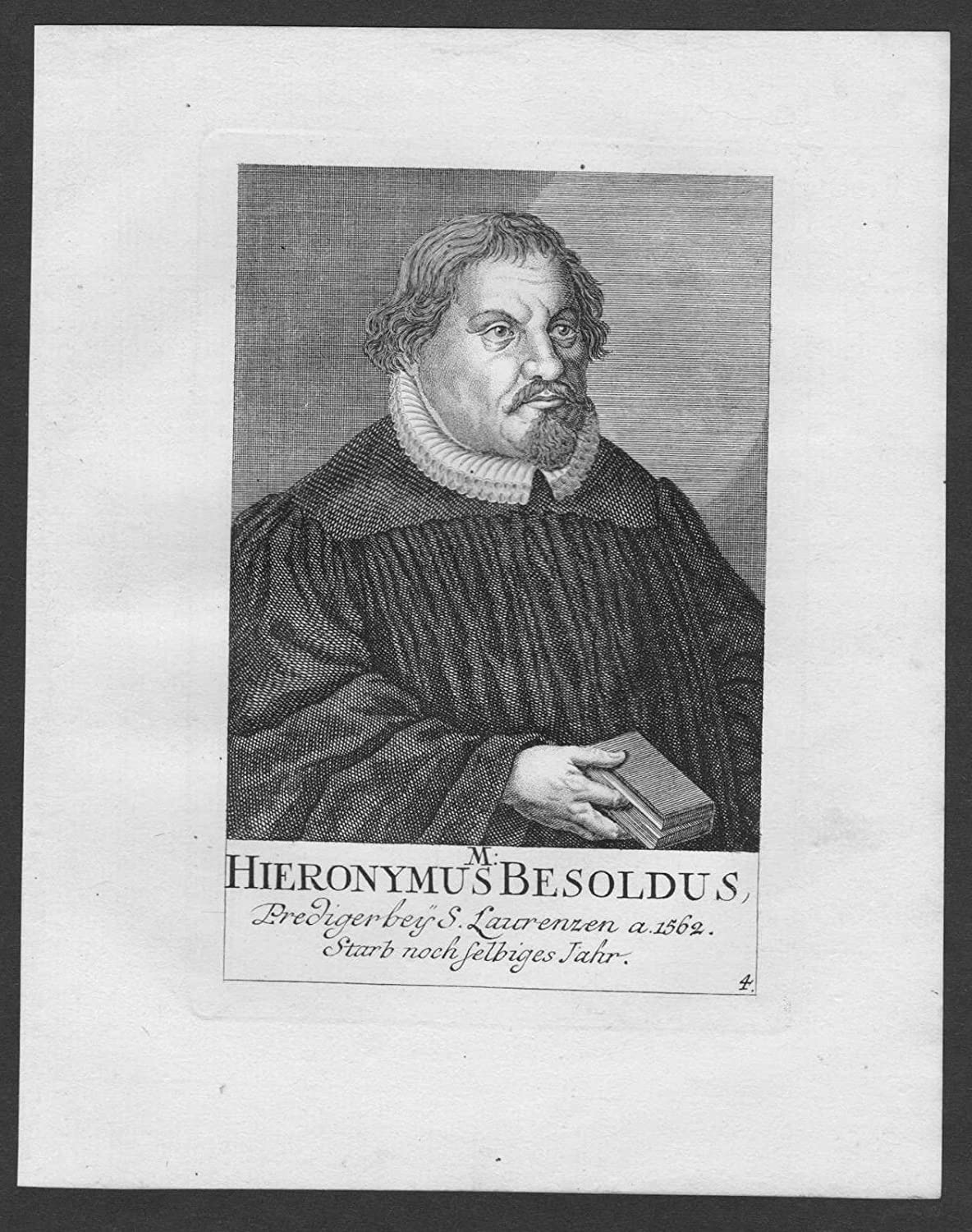 Kupferstich - "Hieronymus Besoldus, Prediger bey St. Laurenzen a. 1562, starb noch selbiges Jahr"